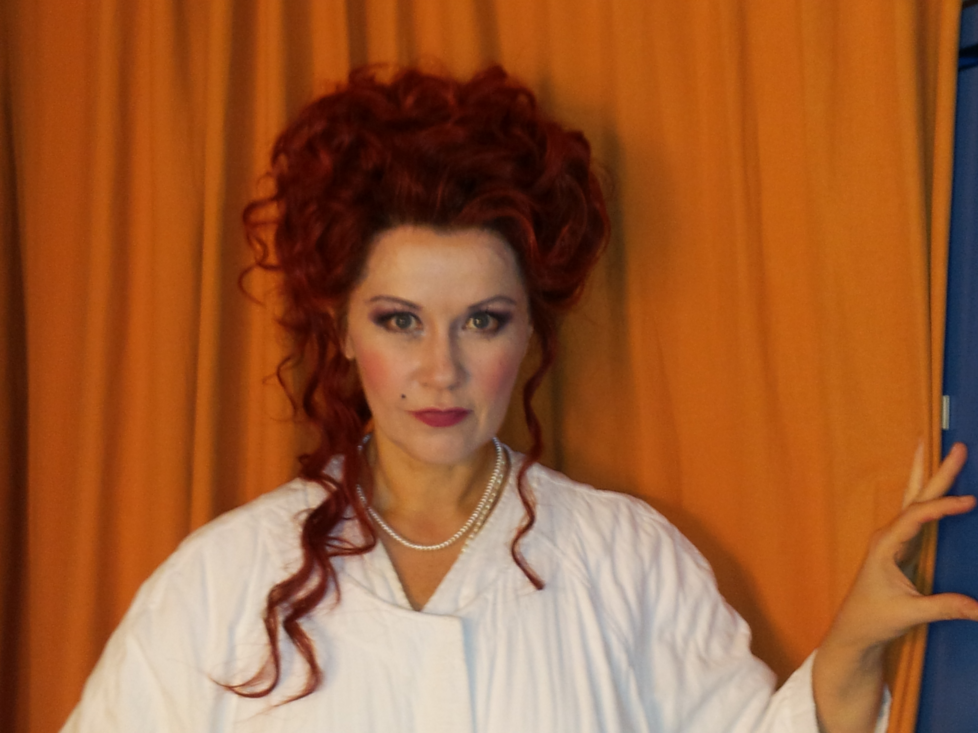 Eröffnungsfest Opernhaus Zürich Liliana Nikiteanu: "Hence, hence, Iris hence away", Arie der Juno von Semele, Händel